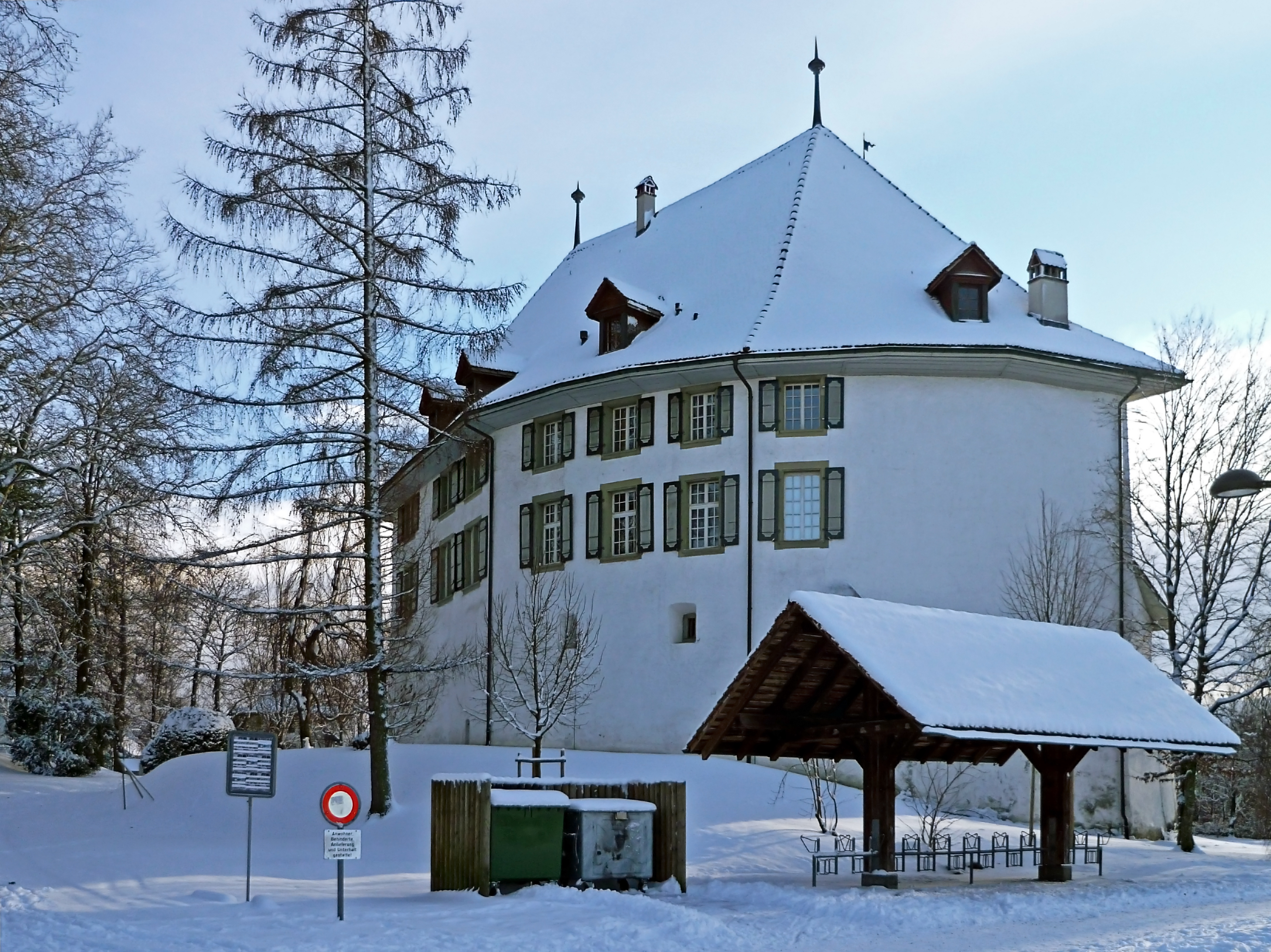 Schloss Münsingen BE im Winter, Nordseite